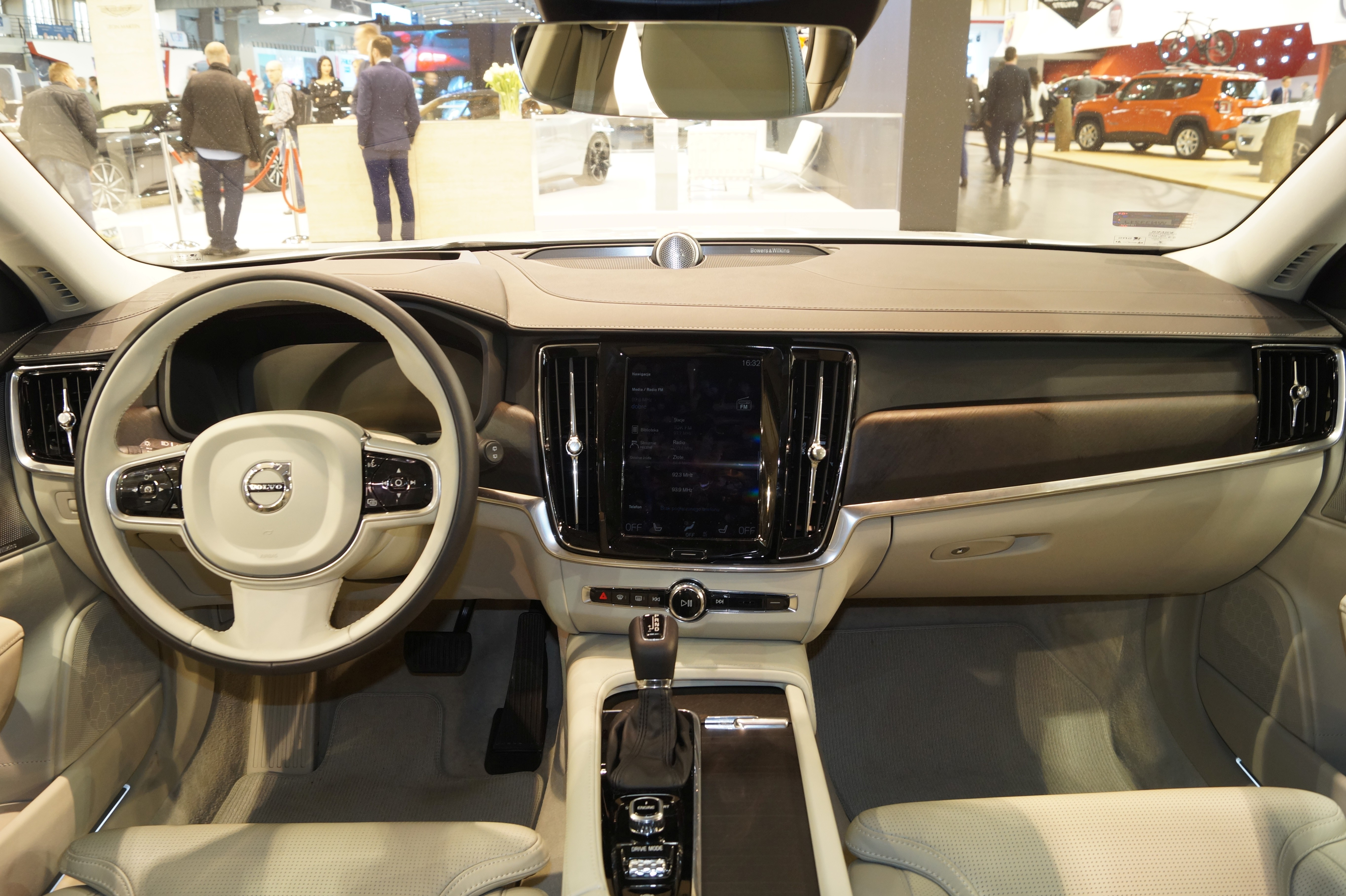 Wnętrze Volvo S90/V90 na Motor Show Poznań 2017.